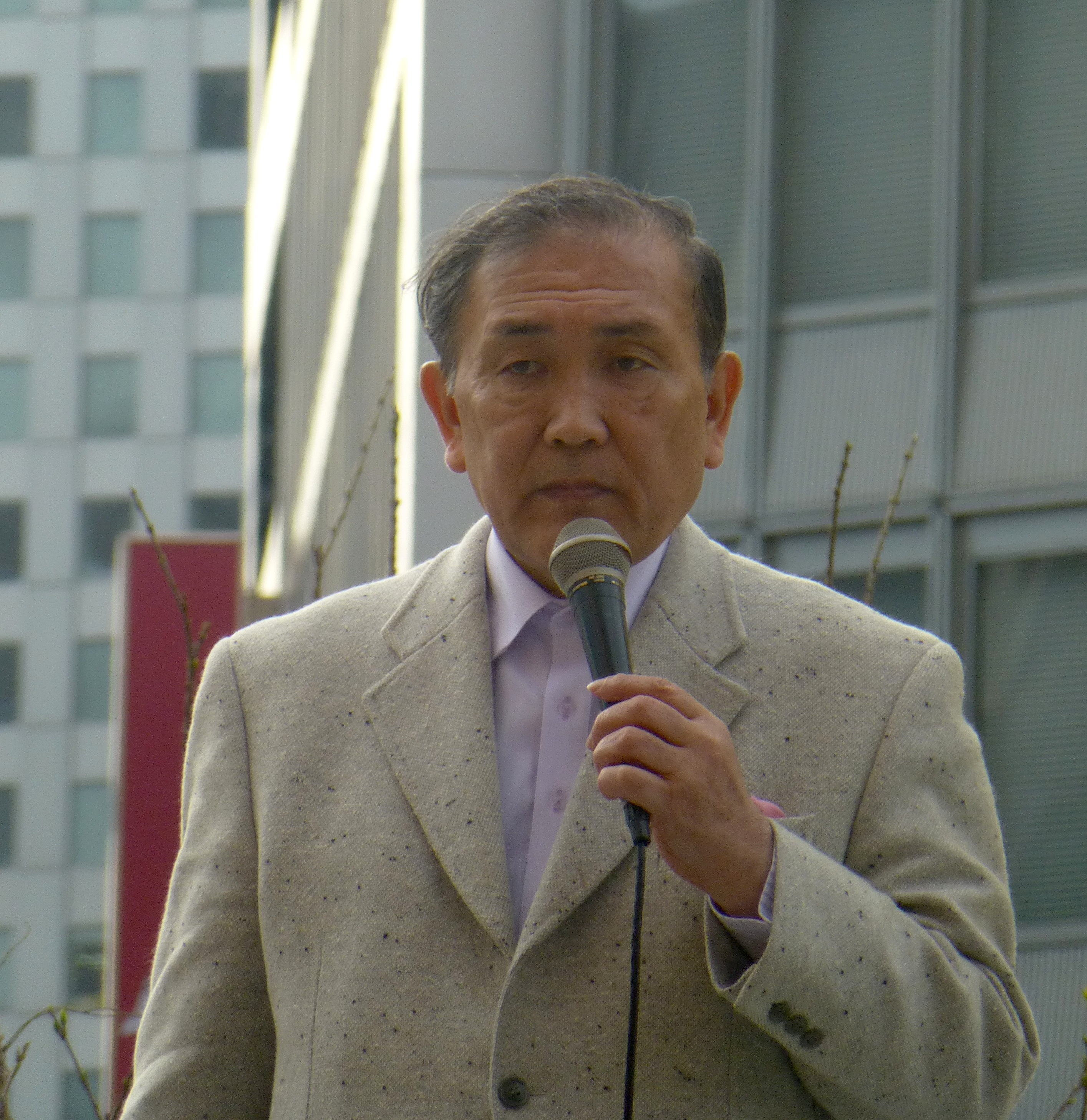 小林興起（こばやし こうき, Kobayashi Koki）